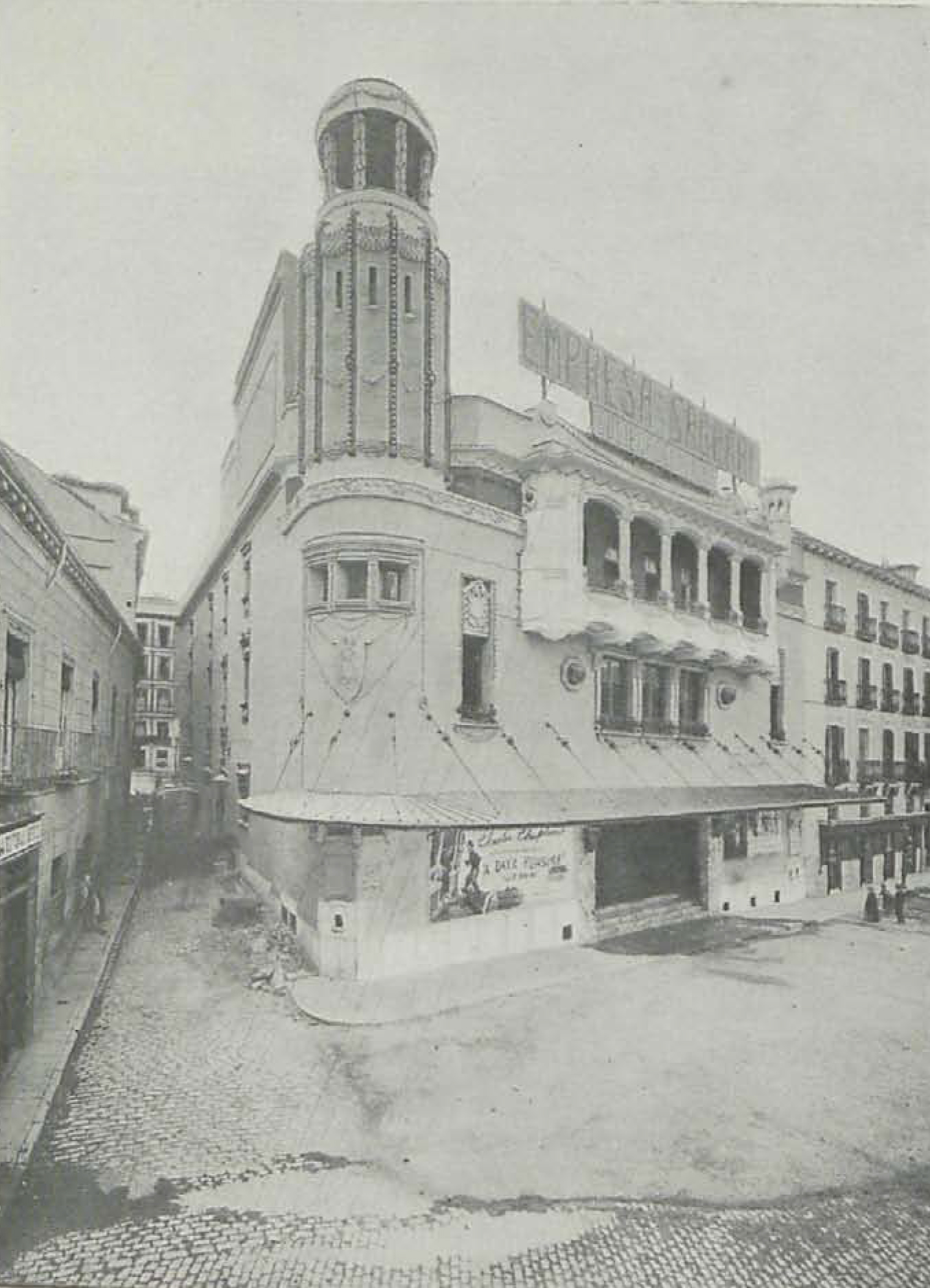 Edificio para cinematógrafo en la plaza de Isabel II, Madrid, fachada.